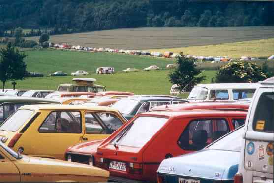 Anreiseverkehr 7. Stemweder Open Air